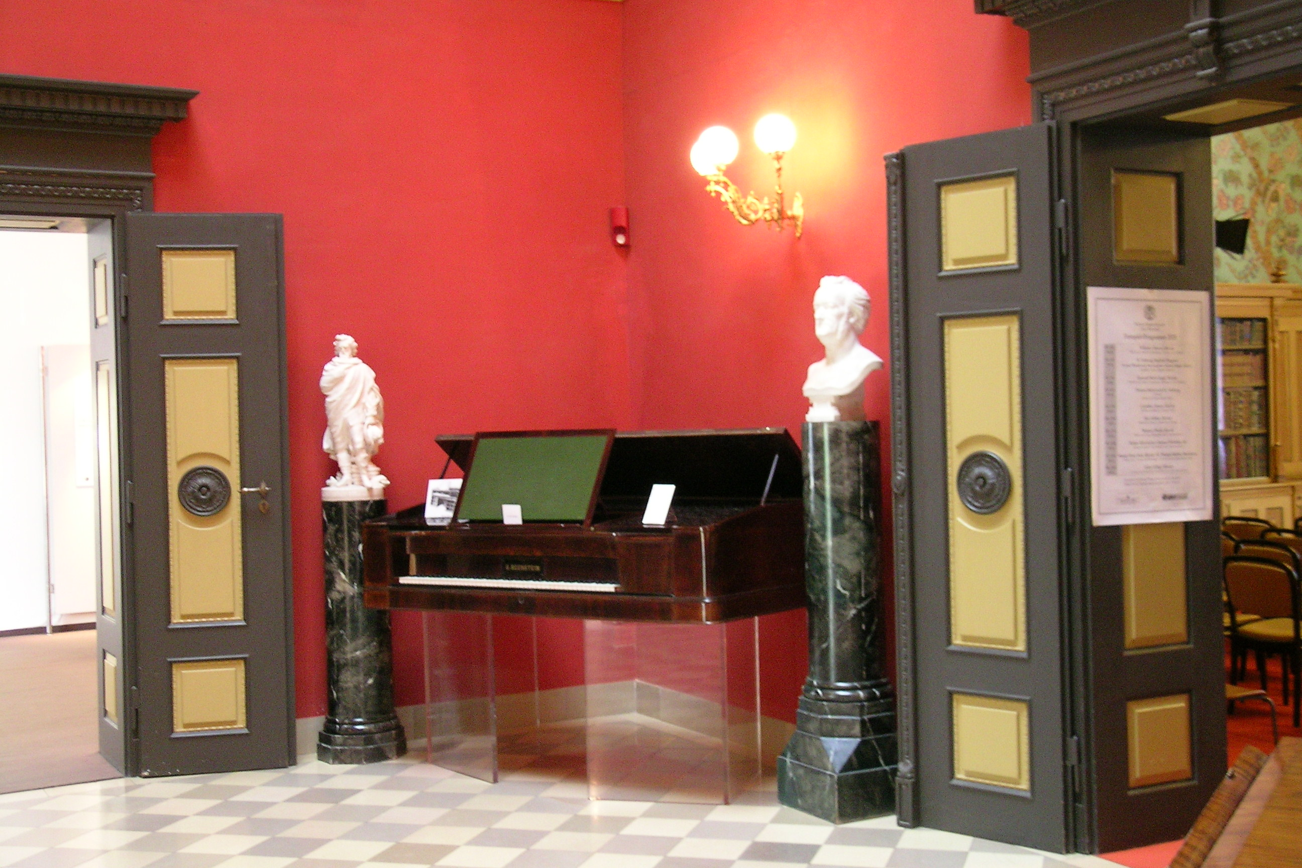 Eingangsbereich von Haus Wahnfried